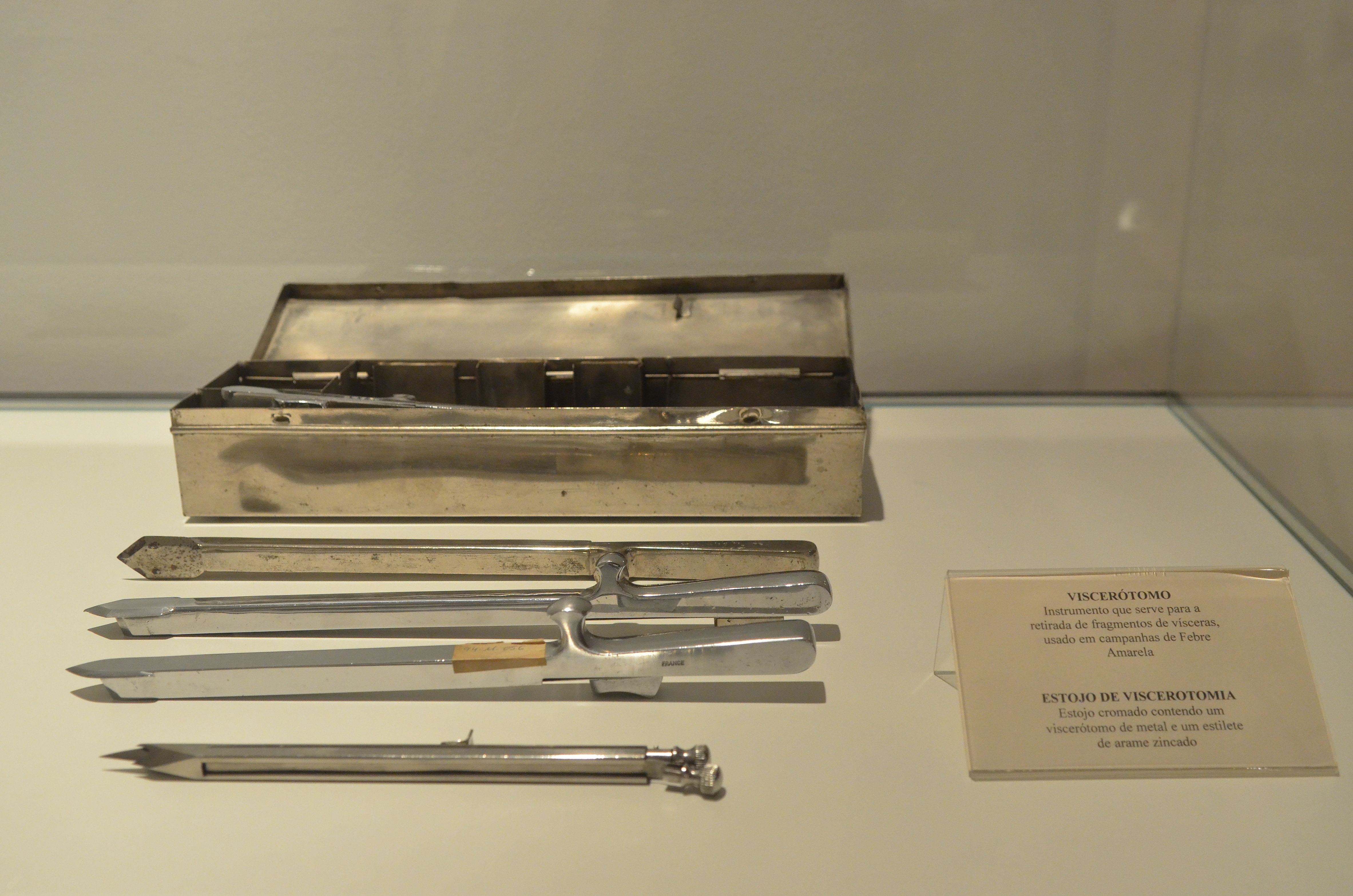 ��Brasília - A exposição À sua Saúde, em cartaz no Museu Nacional, conta a história da saúde no Brasil por meio de pinturas, esculturas e instalações (Elza Fiúza/Agência Brasil)